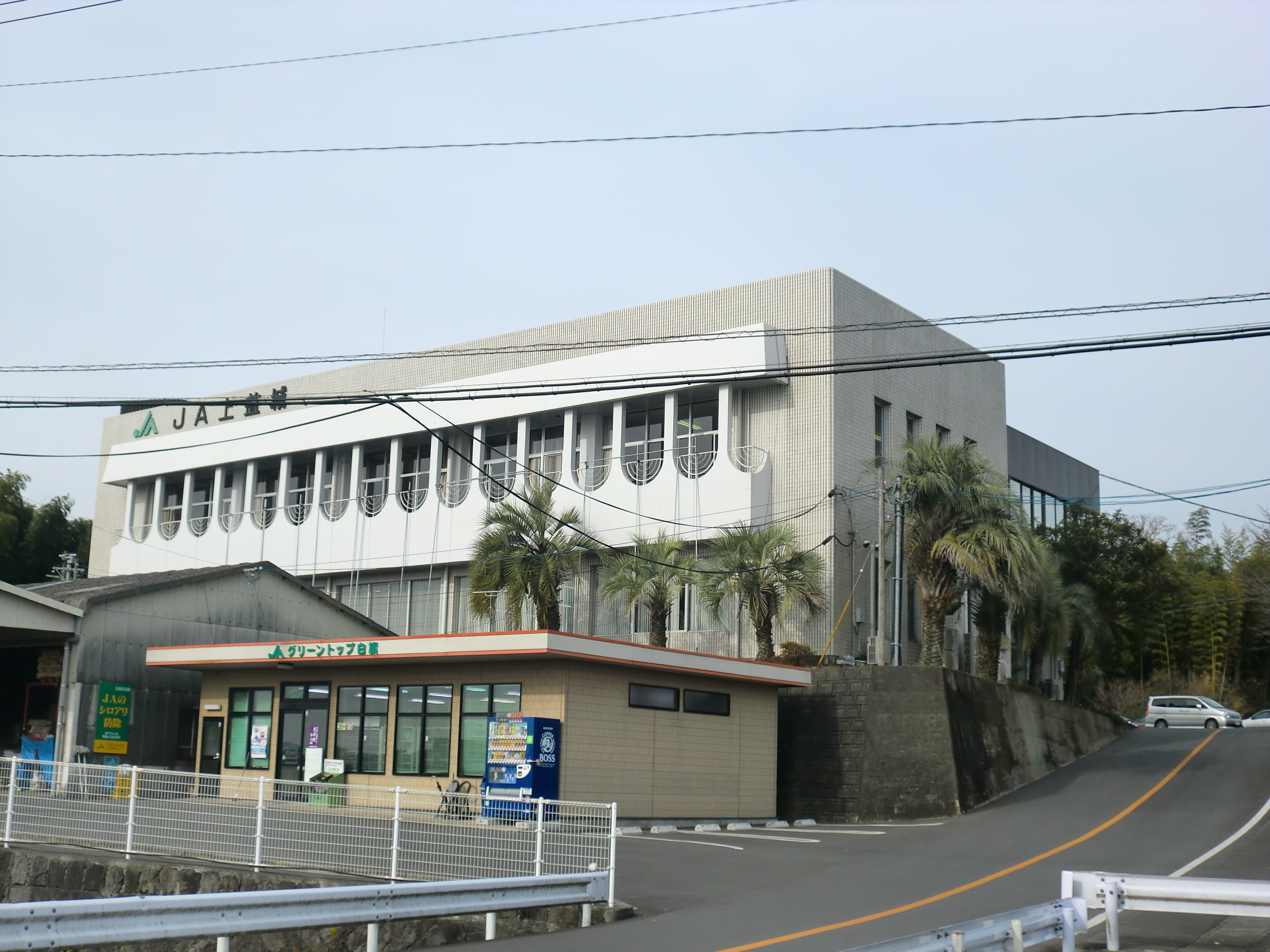 熊本県上益城郡甲佐町にあるJA上益城